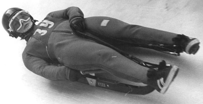 Margit Schumann ADN-ZB Demme 8.1.1972-Imst: Internationale Rennschlitten-Wettbewerbe um den Alpenländerpokal (1. Tag)-Bei ausgezeichneten Bahnverhältnissen und Temperaturen um Minus 6 Grad legte Margit Schumann (DDR), hier bei den Meisterschaften 1971 in Oberhof, die Distanz in der neuen Bahnrekordzeit von 36,88 s zurück und übernahm damit die Führung nach dem ersten Durchgang.